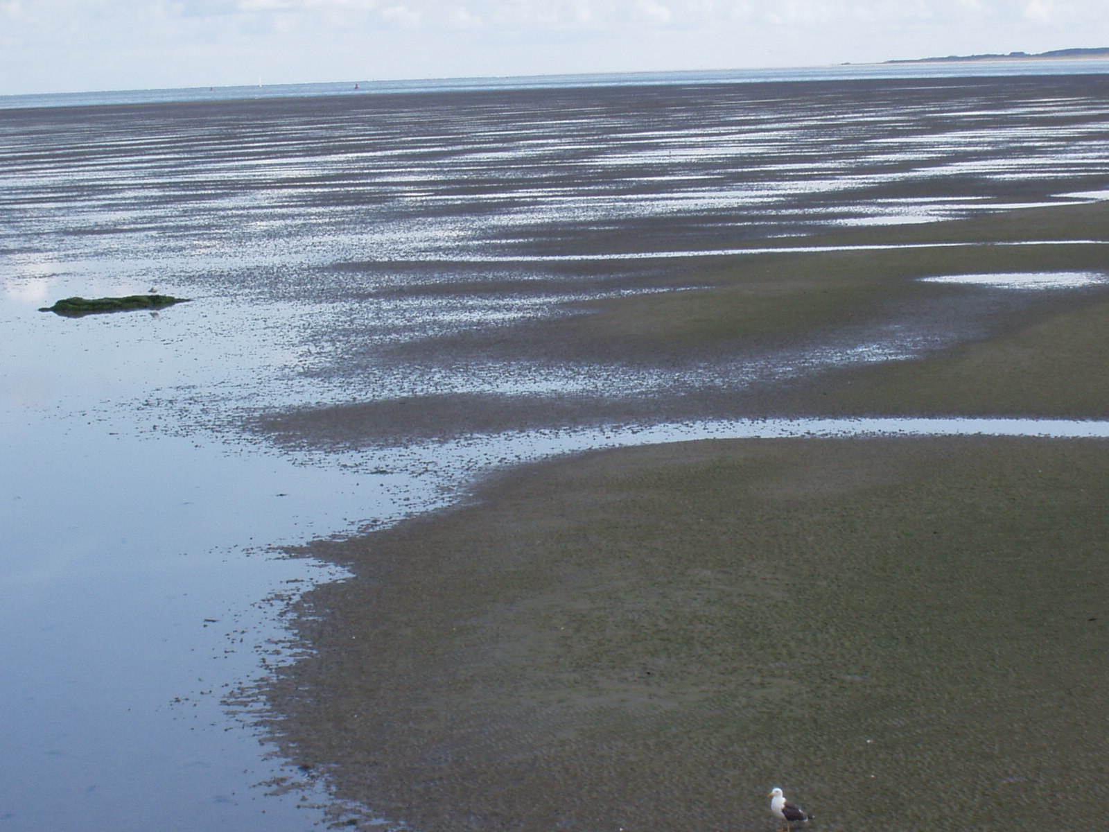 Een blik op de drooggevallen Engelsmanplaat gezien vanuit het vogelwachtershuisje